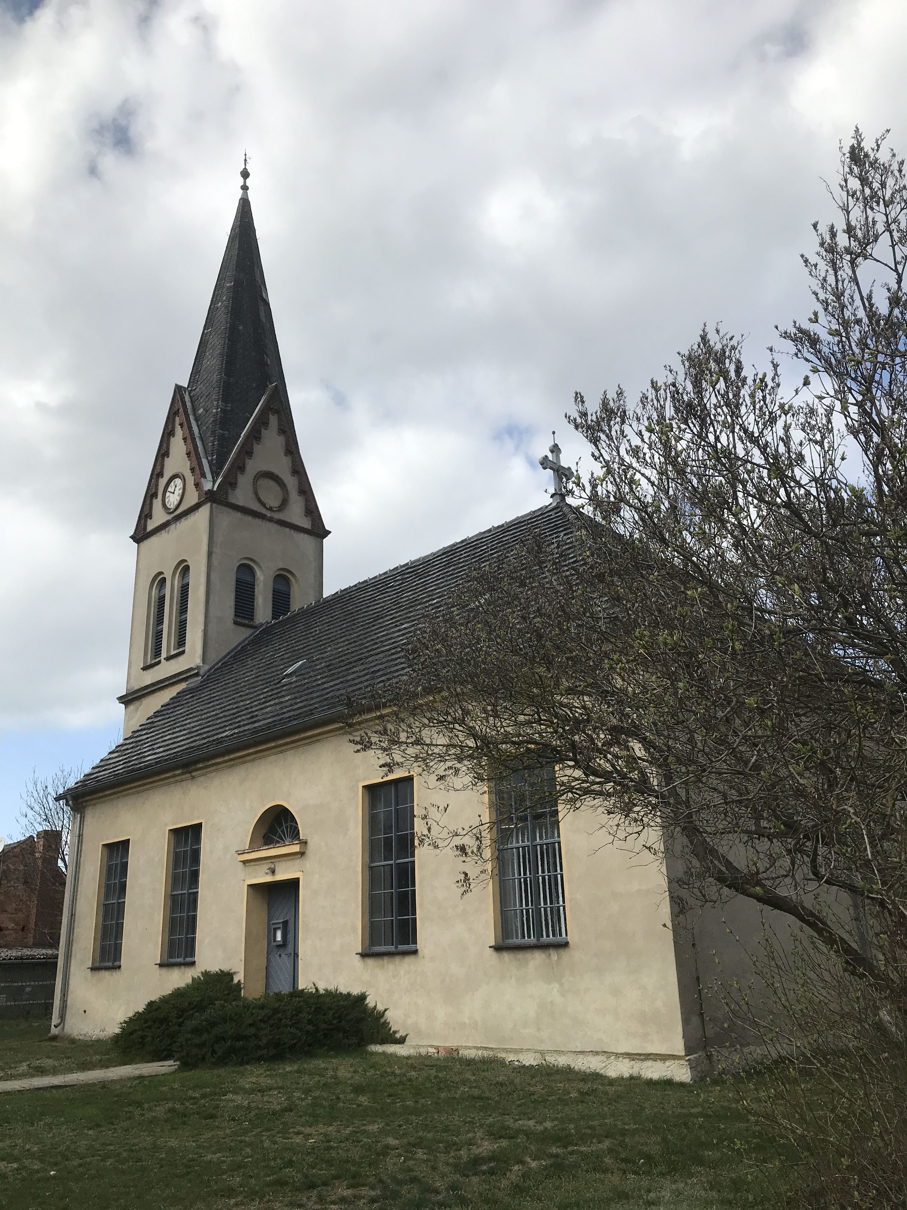 Die Dorfkirche Zinnitz, einem Ortsteil der Stadt Calau im Landkreis Oberspreewald-Lausitz in Brandenburg entstand im Jahr 1818 im Auftrag des Gutsbesitzers.